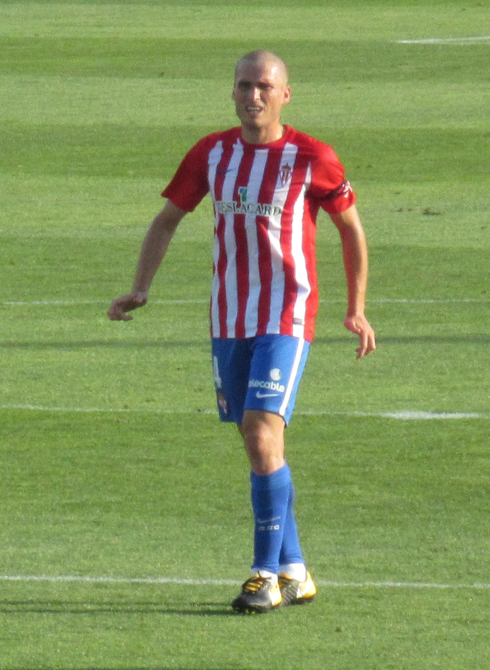 Alex Bergantiños, durante el Alcorcón-Sporting de la temporada 2017-18.